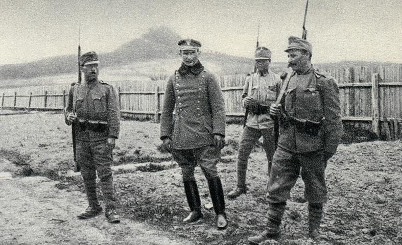 Por. Norbert Okołowicz (jeden z legionistów oskarżonych w procesie o zdradę stanu) pod potrójną strażą.